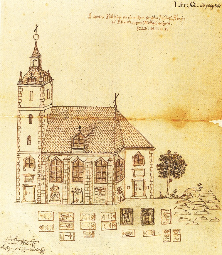 Zeichnung der alten Pillnitzer Schlosskirche kurz vor dem Abbruch 1723